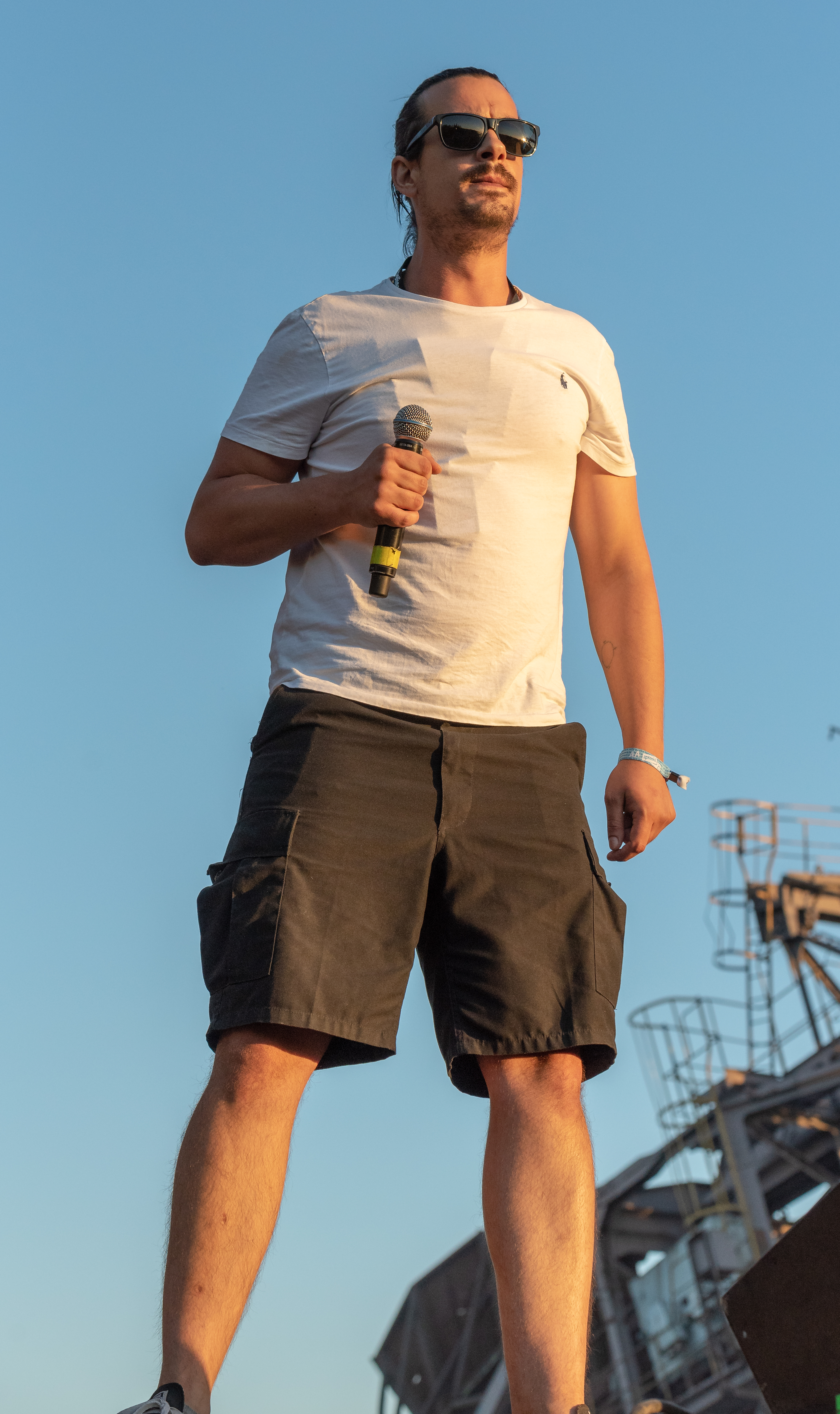 Haze auf dem Splash! 21